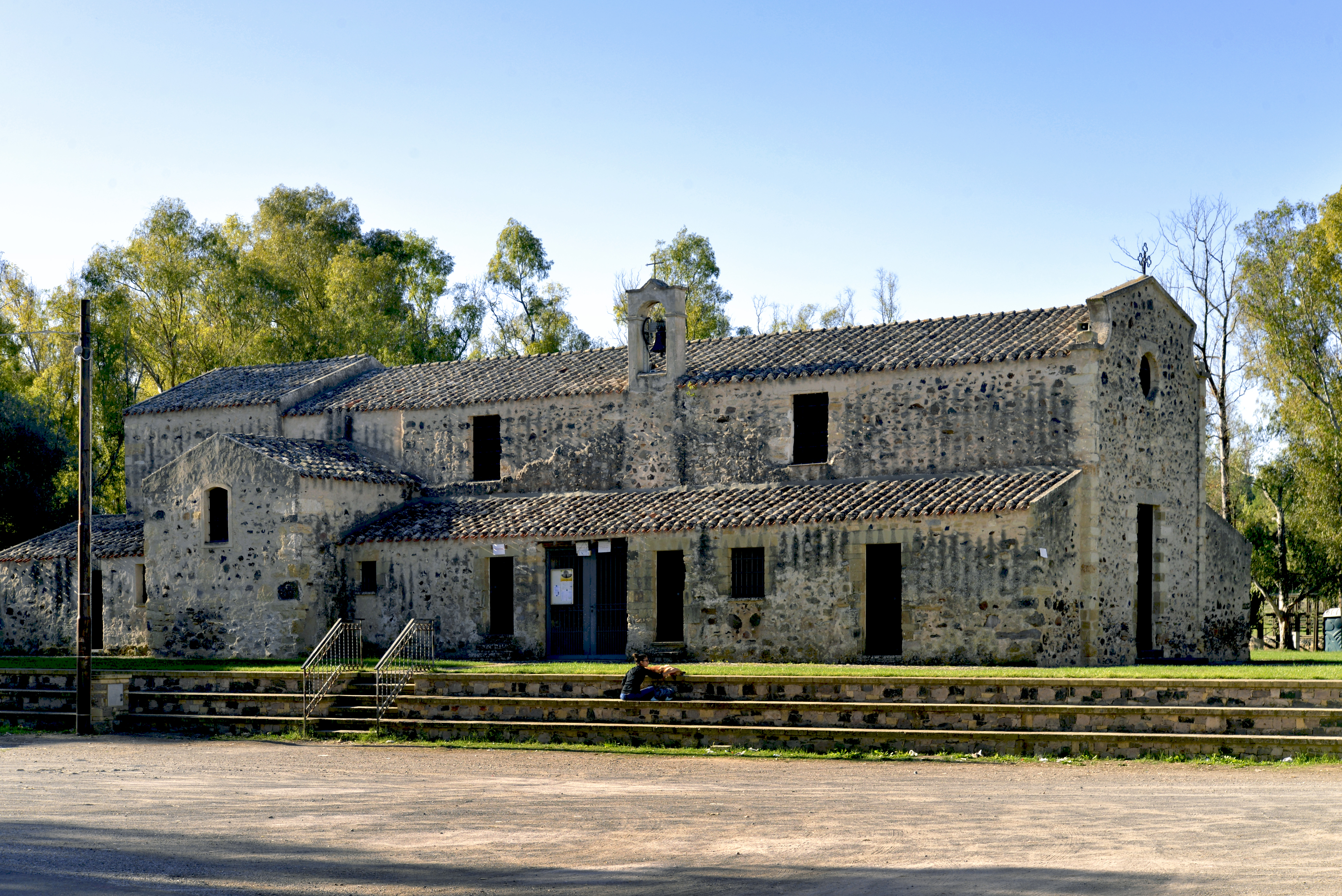 Sardara, Sardaigne (Italie) - L’église Sainte-Marie Acquas (Chiesa di Santa Maria delle Acque) est un sanctuaire diocésain datant des XIe - XIIe siècles.